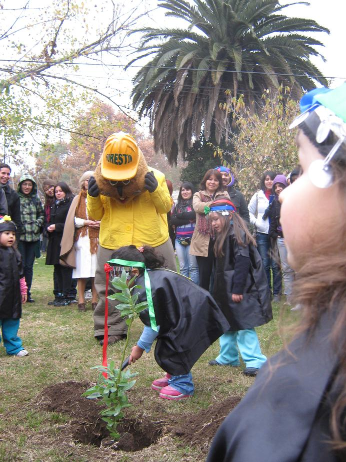 Forestín y los parvulos de la UMCE, plantando un canelo (Drimys winteri) árbol sagrado del pueblo mapuche. Durante una feria de Salud